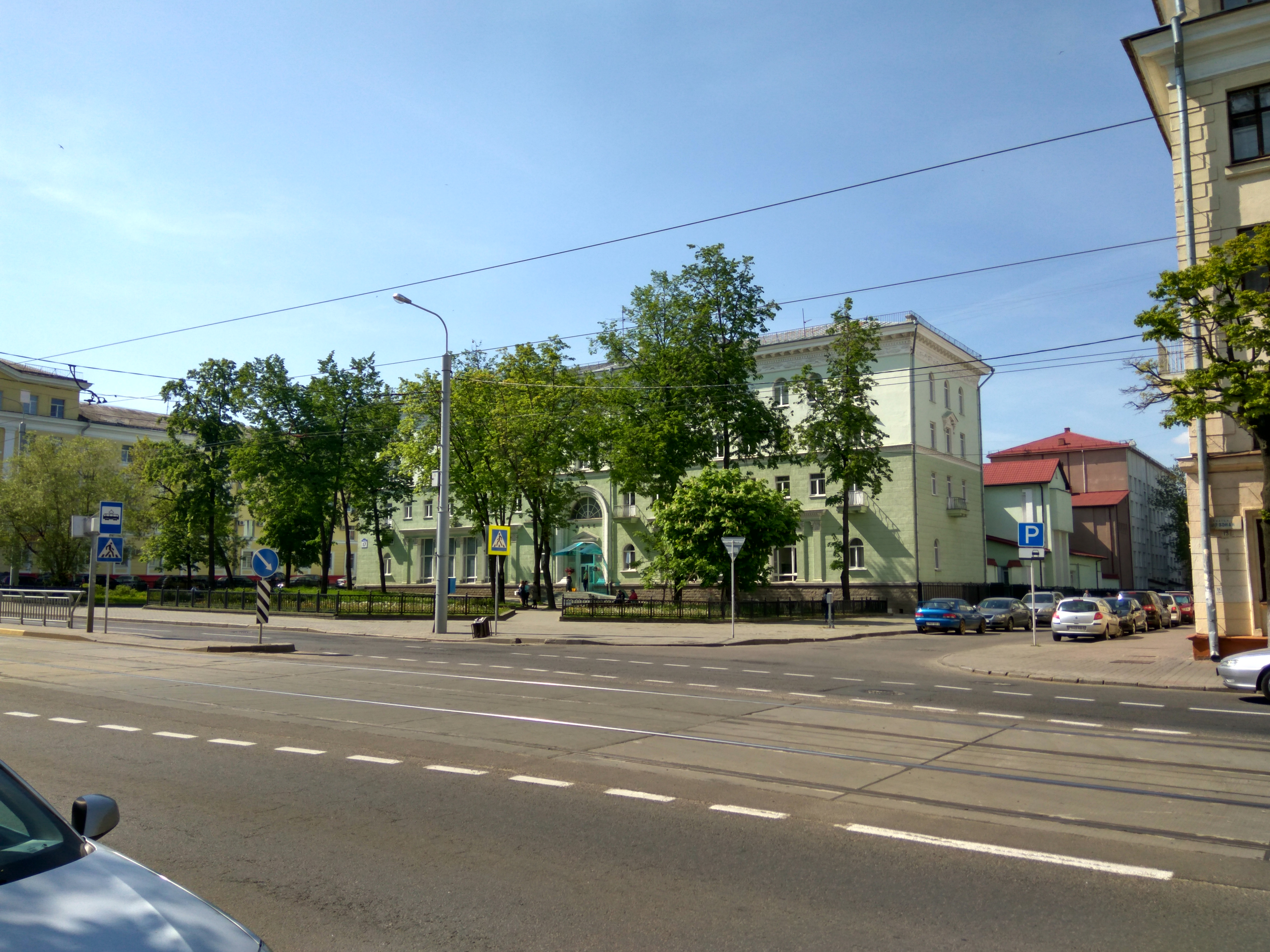 Мінск. Вуліца Чырвоная (Красная). Красны сквер